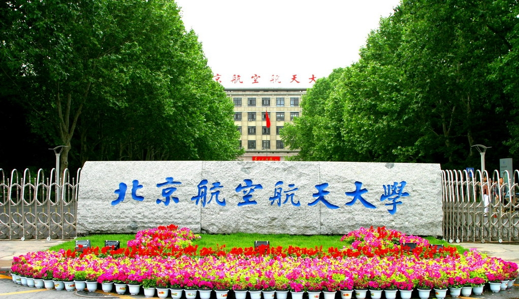 北京航空航天大学东门 BUAA